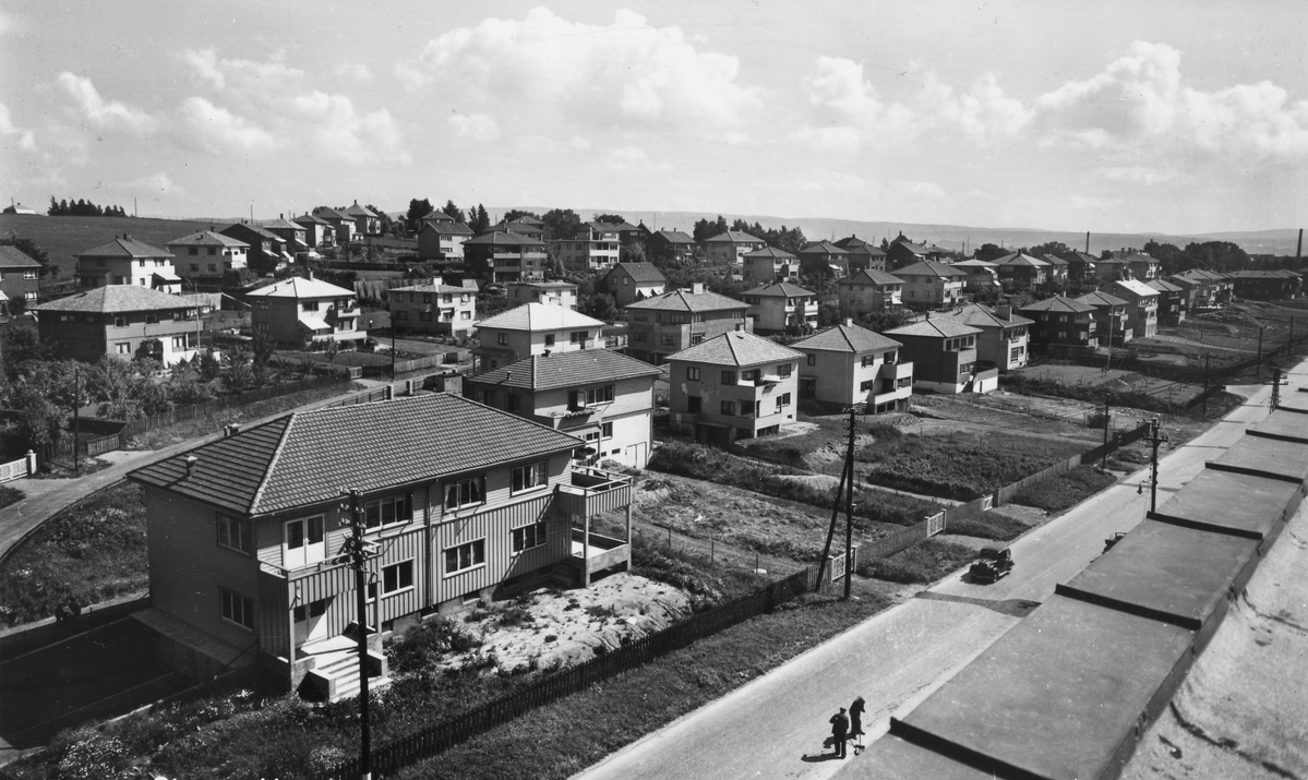 Sinsen hageby. Lørenveien nærmest. Utsikt fra nr. 7 med nr 8 helt til venstre. Veien bak er Breisjåveien. 1938 — 1940